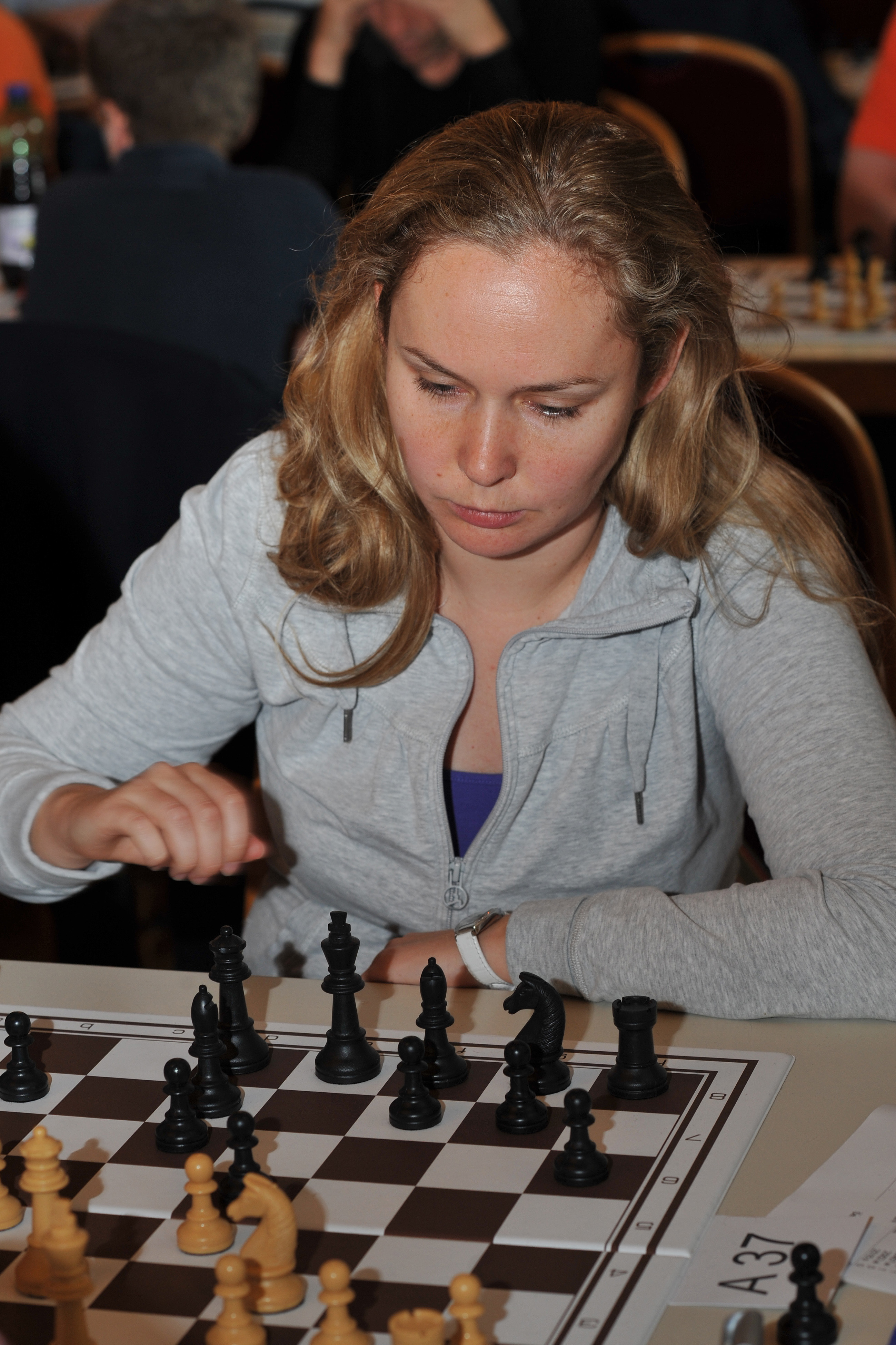 Vienna Chess Open 2013, A-Turnier: 8. Runde am 24. August 2013 - WGM Mariya Sergeyeva